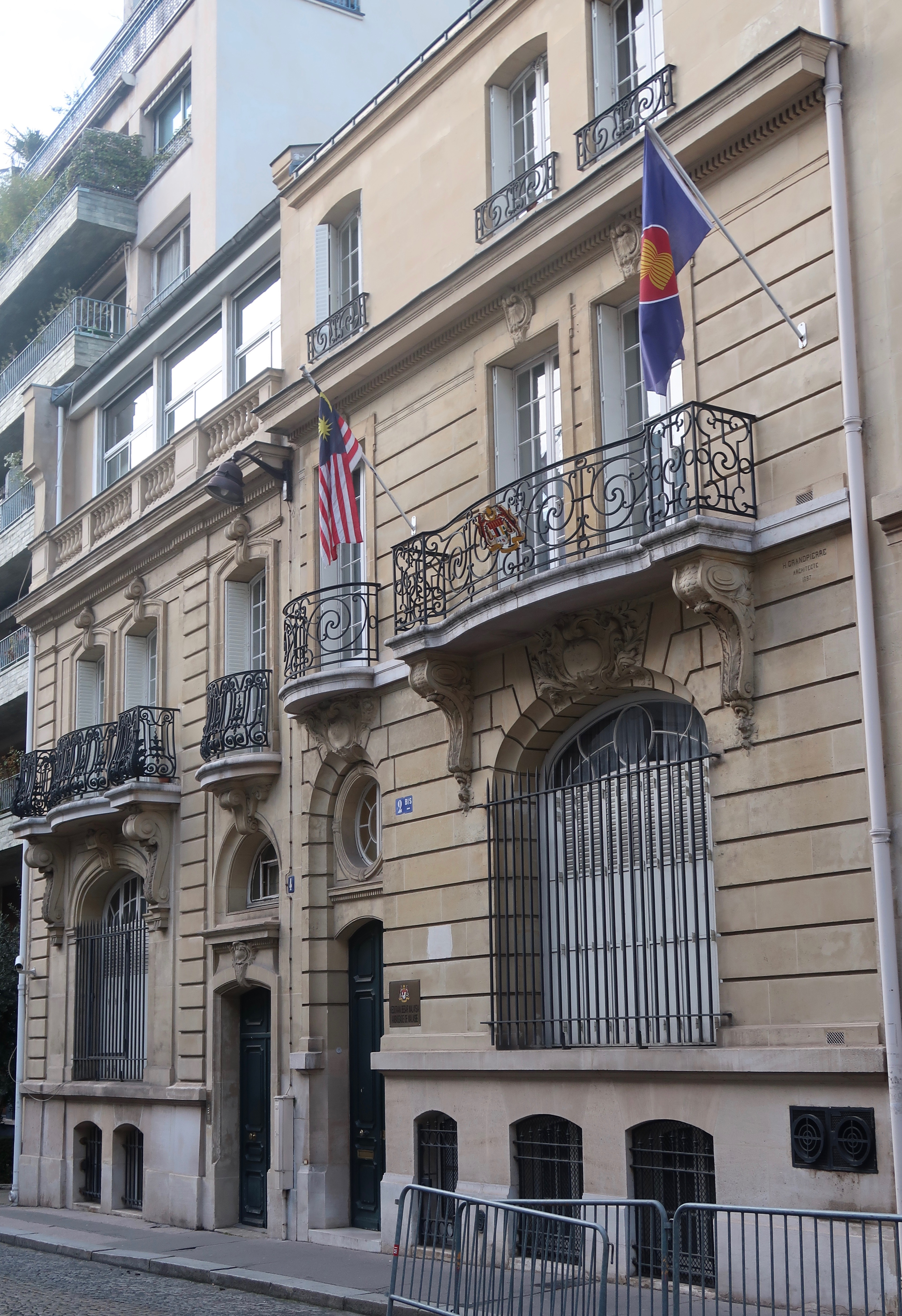 Ambassade de Malaisie en France, 2 bis rue Benouville (Paris, 16e).